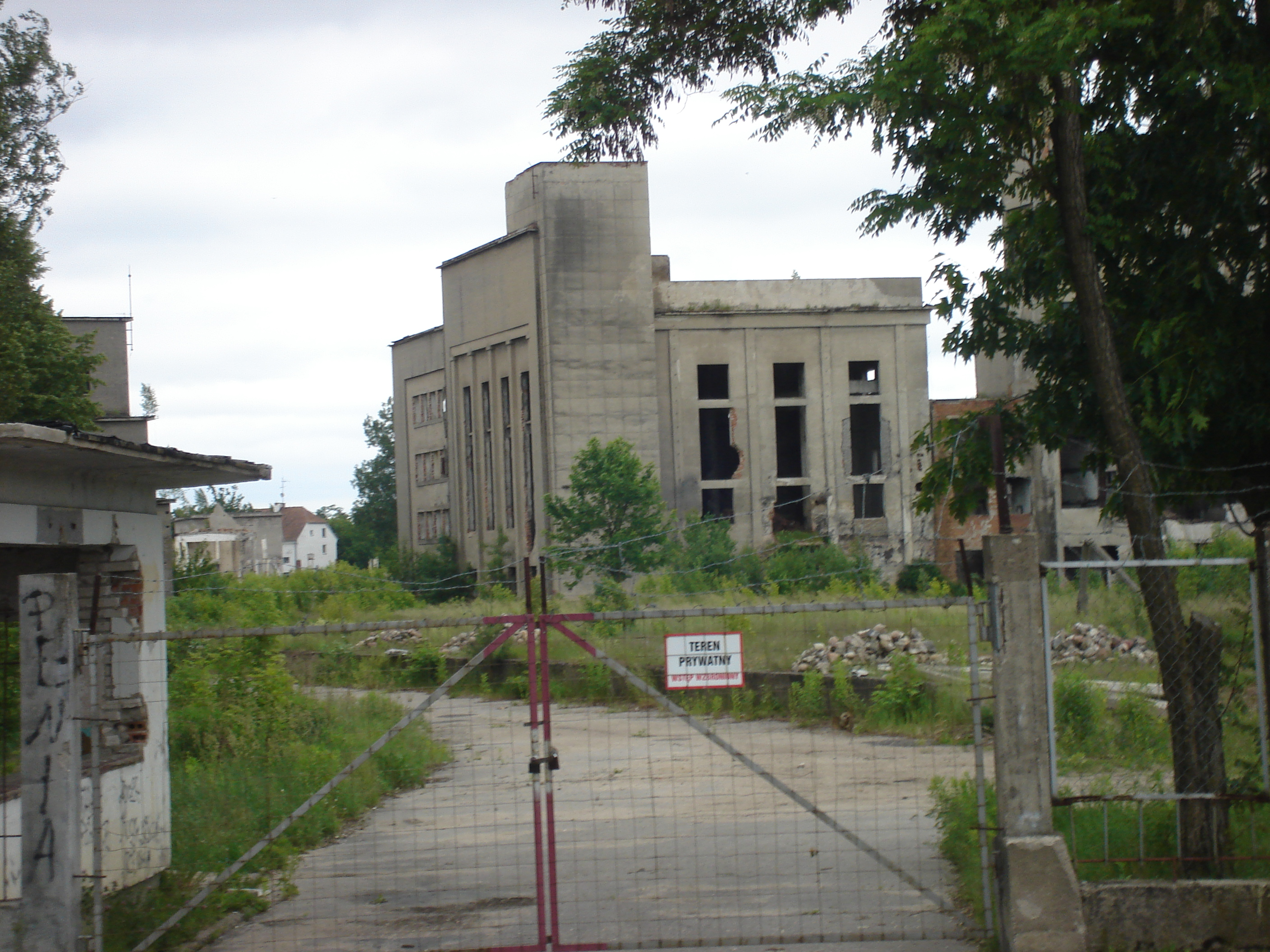 Zakład Płyt Pilśniowych i Wiórowych w Nidzie